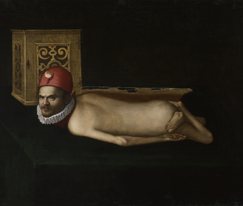 Bildnis eines behinderten Mannes, Schloss Ambras Innsbruck 'Bildnis eines behinderten Mannes', Öl auf Leinwand (16. Jahrh.), Schloss Ambras Innsbruck (Kunst- und Wunderkammer). Kunsthistorisches Museum Wien, GG 8344.